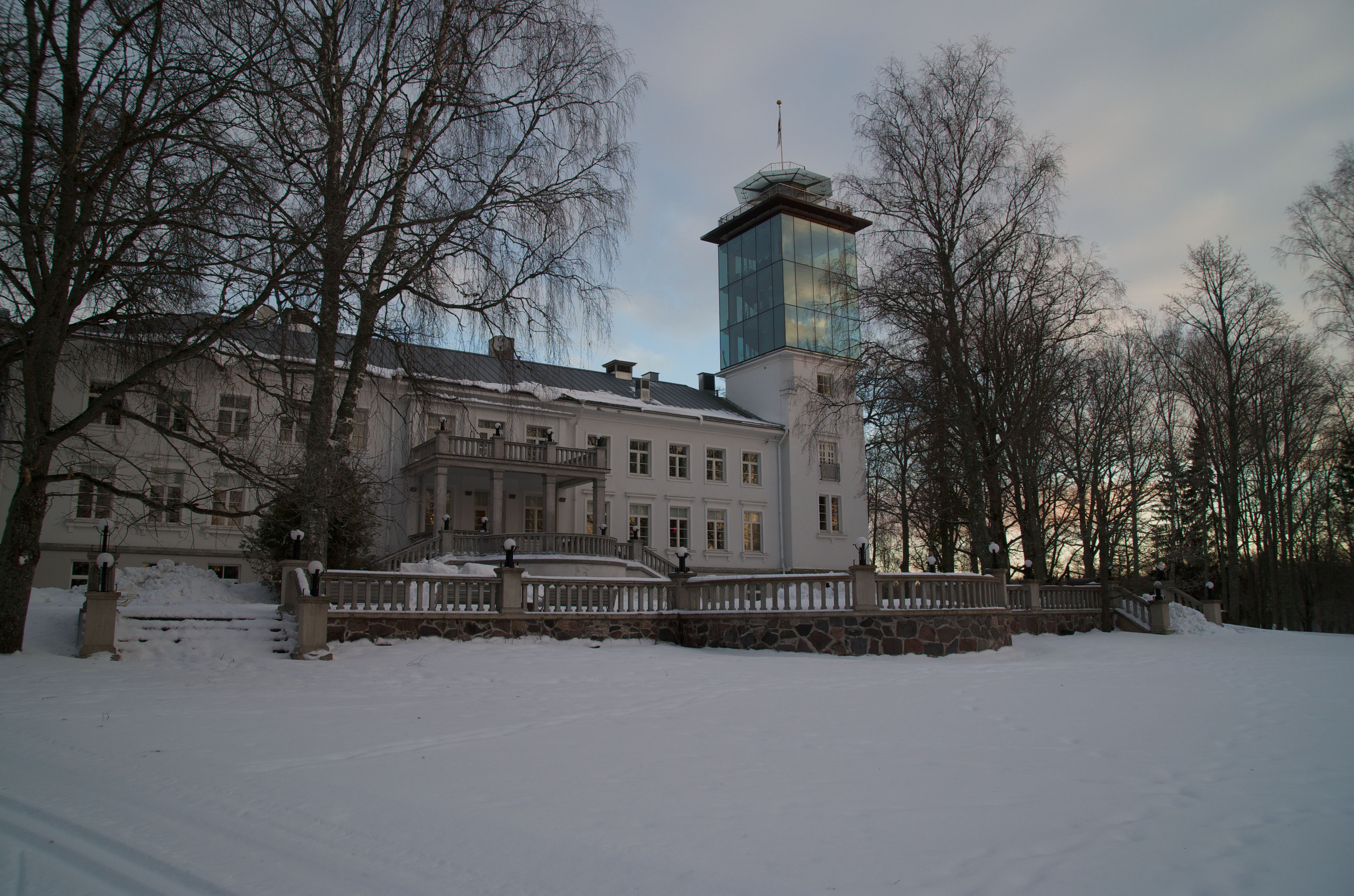 Pühajärve mõisa peahoone